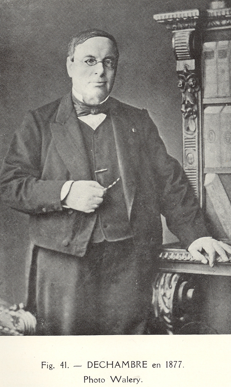 Amédée Dechambre Photographie P. Walery